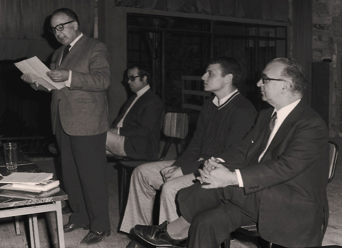 Fotografia d'Ismael Latorre Mendoza, del 06-06-1971, durant el discurs d'En Vicent Hervàs, d'Alginet, administrador de Correus. La foto es va fer a la presentació del poemari titulat Poemes Home-Terra, d'En Josep Lozano i Lerma, al salón Imperio d'Alginet. De dreta a esquerra: Manuel Sanchis Guarner, Josep Lozano i Lerma i Vicent Espí.